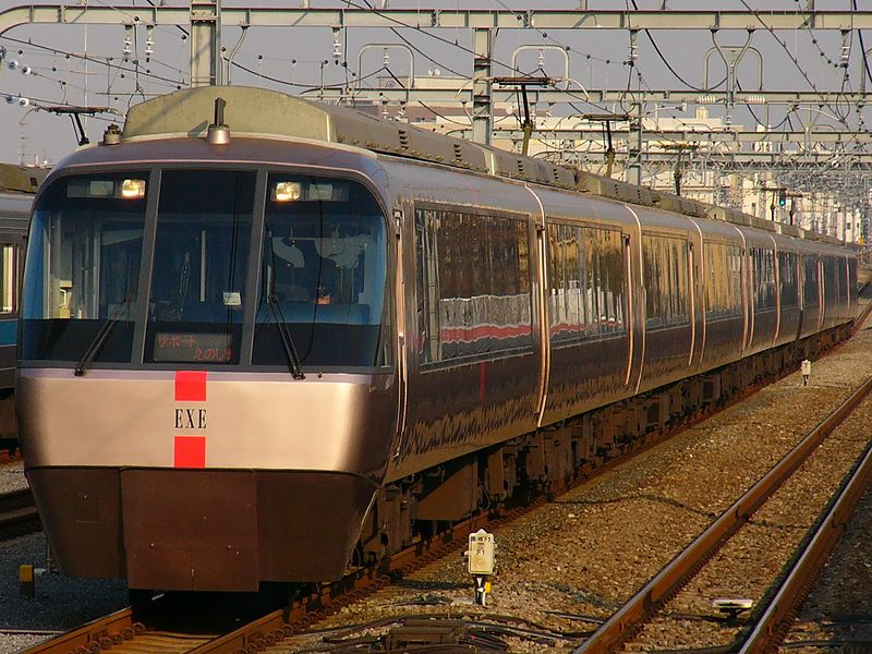 複々線を走るja:小田急30000形電車 撮影者・投稿者：Chabata k 撮影日：2004年11月23日 撮影場所：東京都ja:世田谷区 小田急電鉄ja:祖師ヶ谷大蔵駅